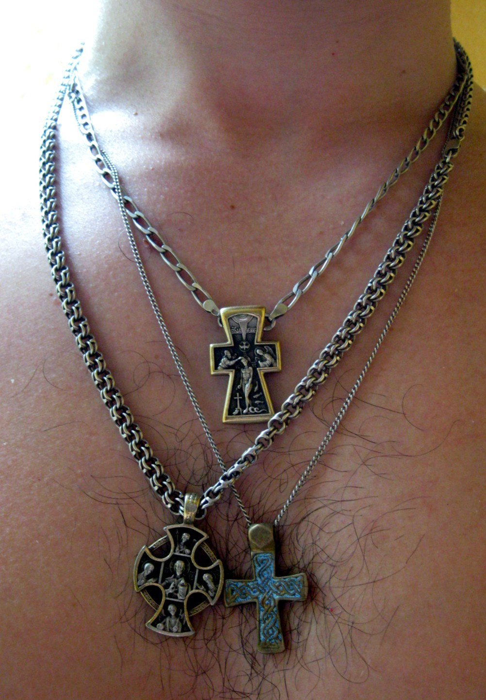 Кресты нательные; №1-2 работа ювелира Юрия Анатольевича Федорова (наши дни), - "Деисус - Ангел-Хранитель", 2 - "Крещение", №3 - позеленевший, реплика древнерусского крестика, найденного в раскопках